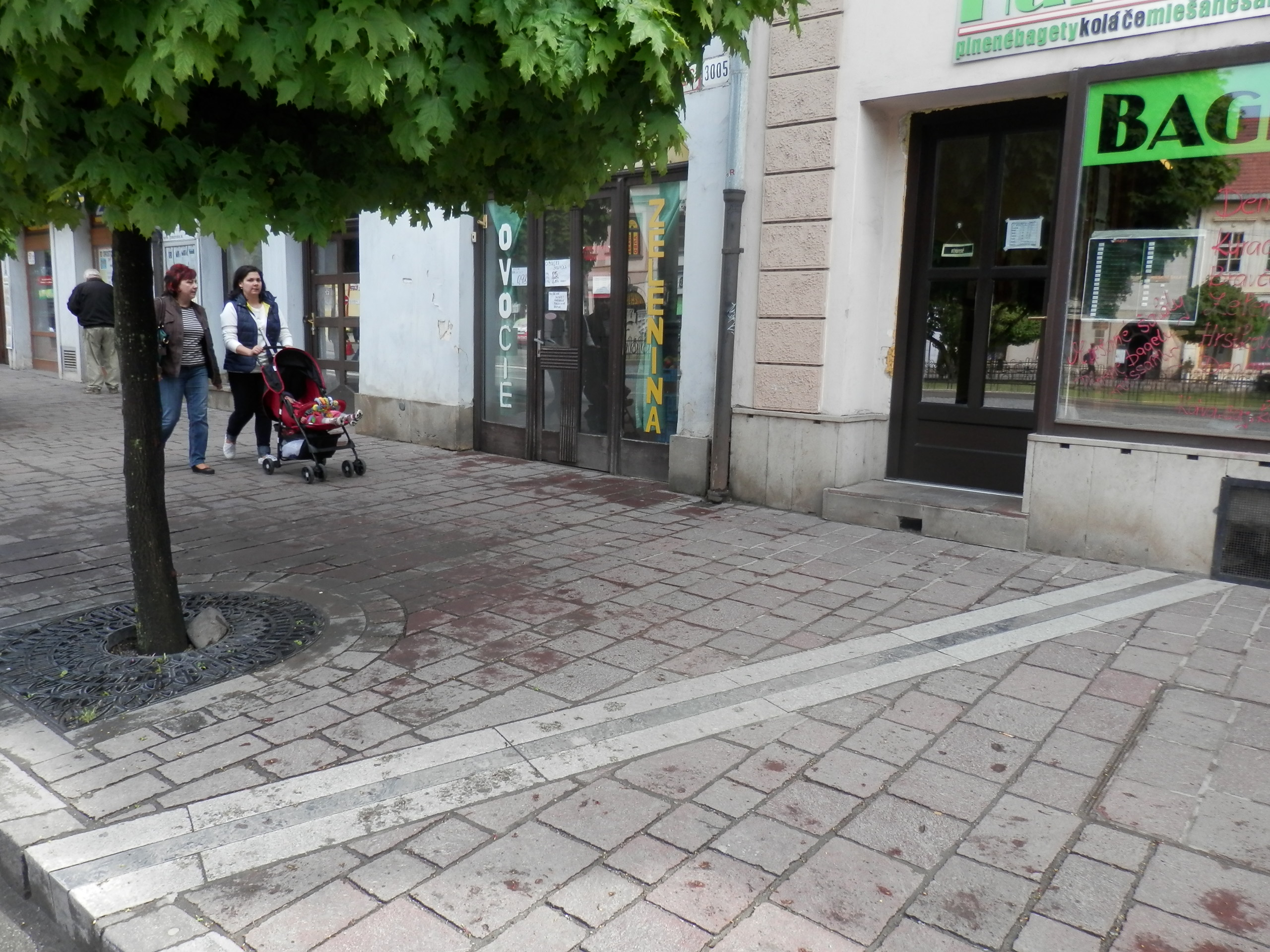 Označenie 49. rovnobežky, ktoré sa v meste Prešov nachádza pri severnom parku, za Trojicou, na Hlavnej ulici.